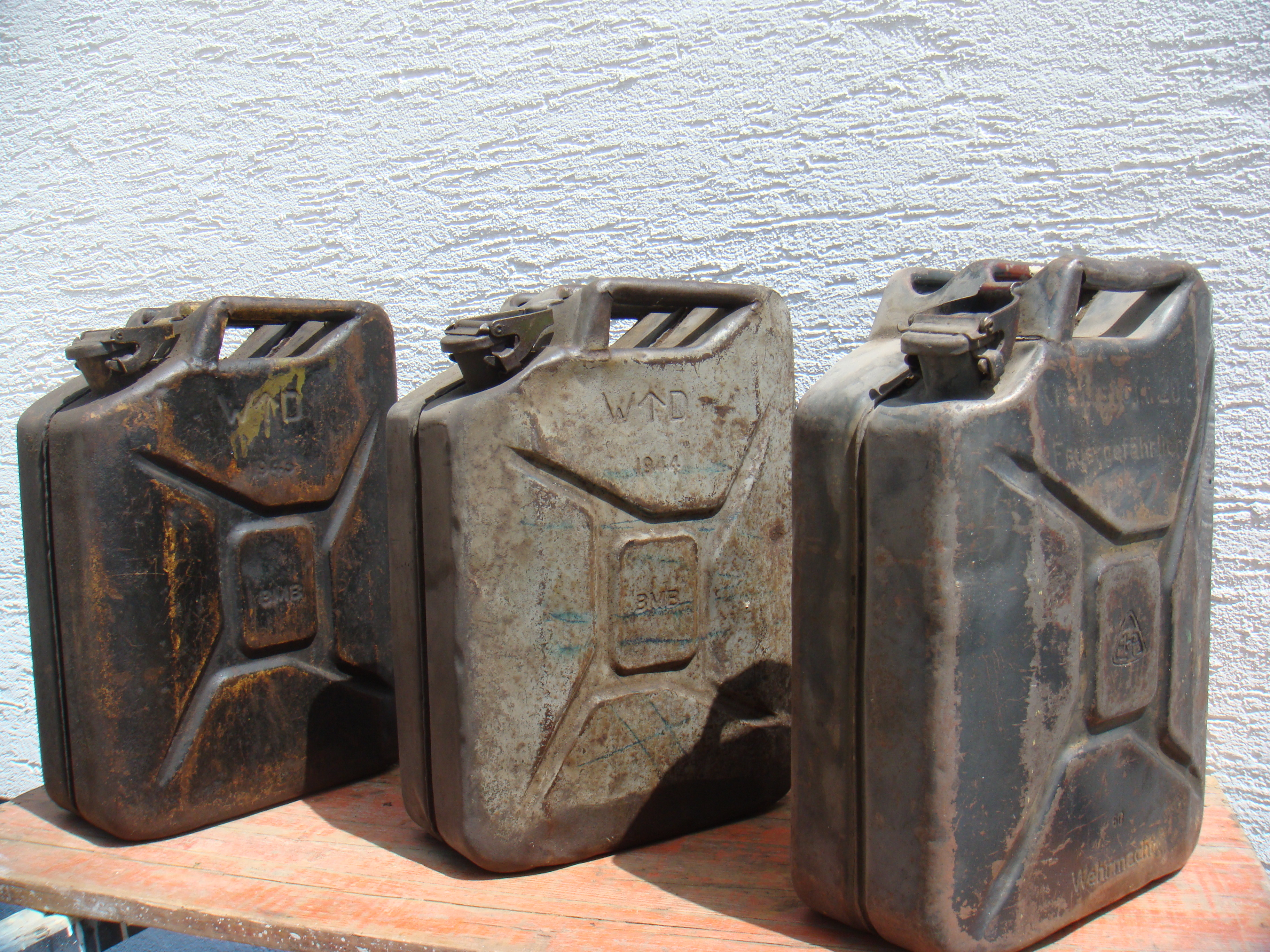 3 verschiedene Jerrycans